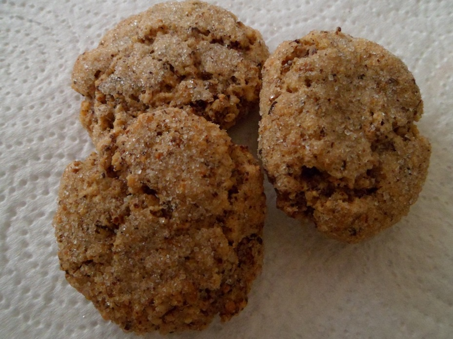 L'amaretto, tipico dolce caposelese